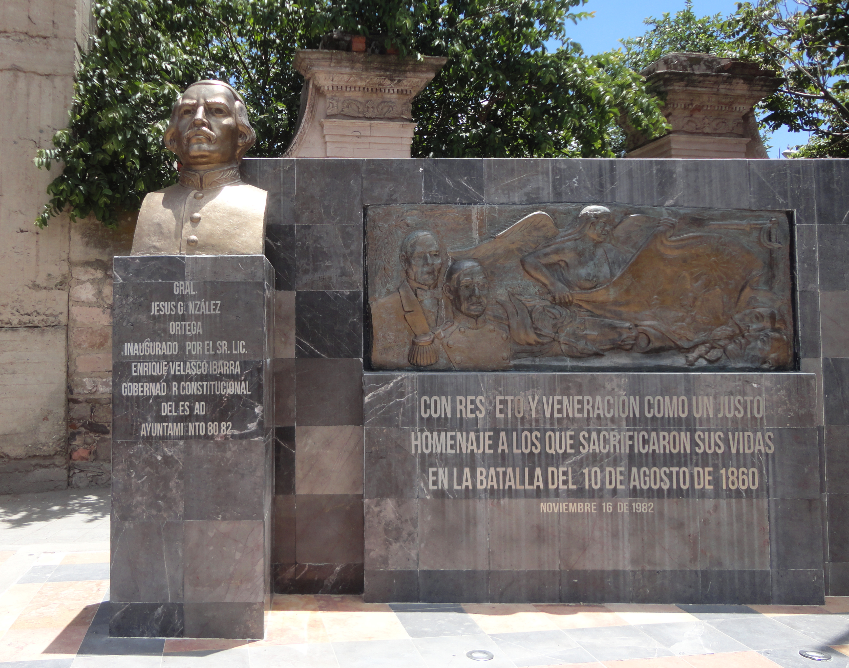 Monumento a los caídos en la Batalla de Silao (10 de agosto de 1860) - Silao, Guanajuato, México.